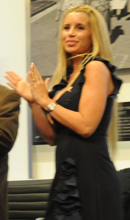 Actriz Florencia Peña